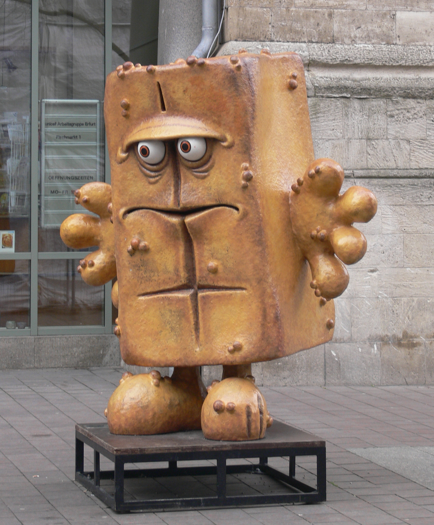 Skulptur "Bernd das Brot" auf dem Fischmarkt in Erfurt